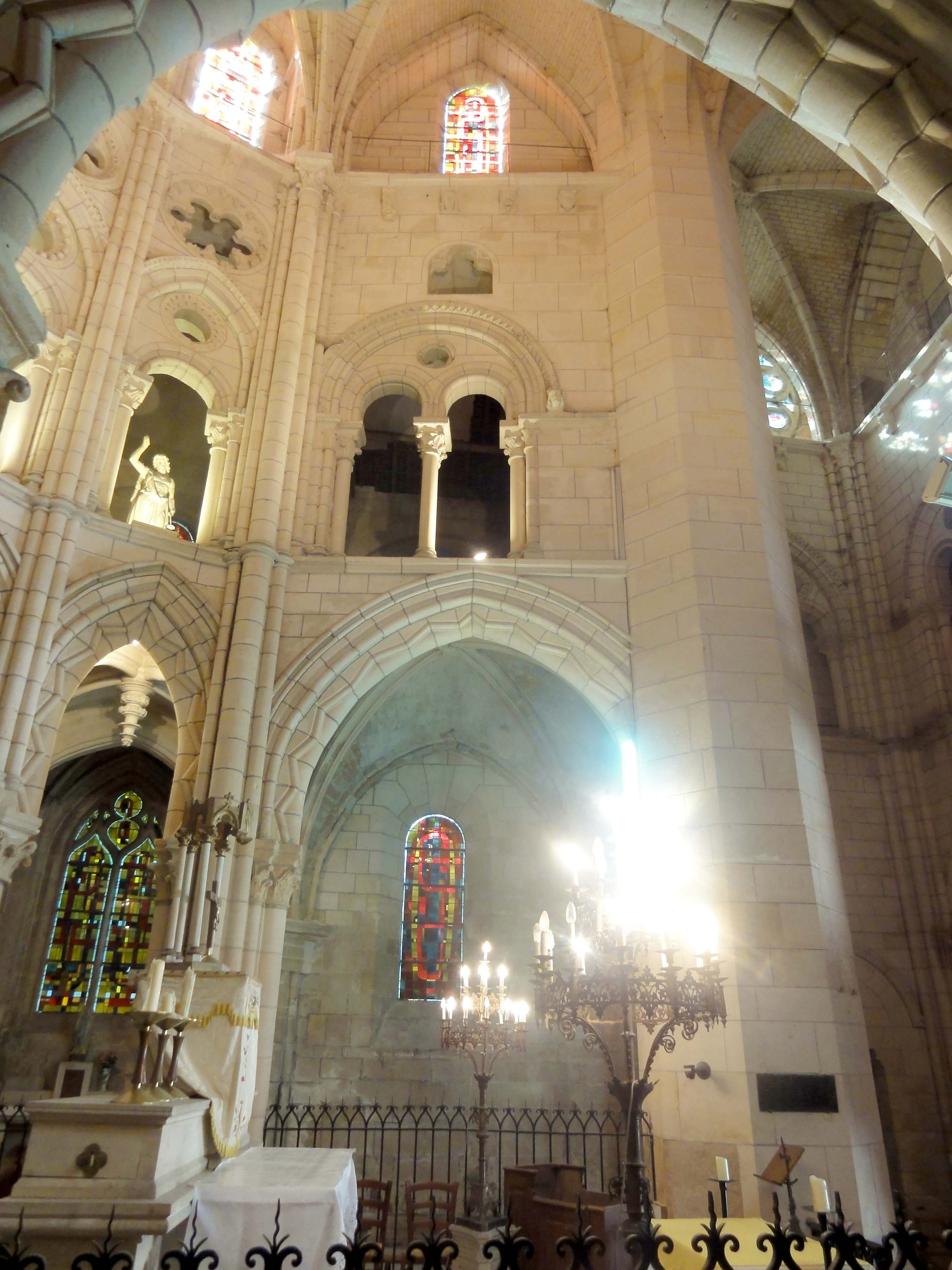 Abside, élévation sud.